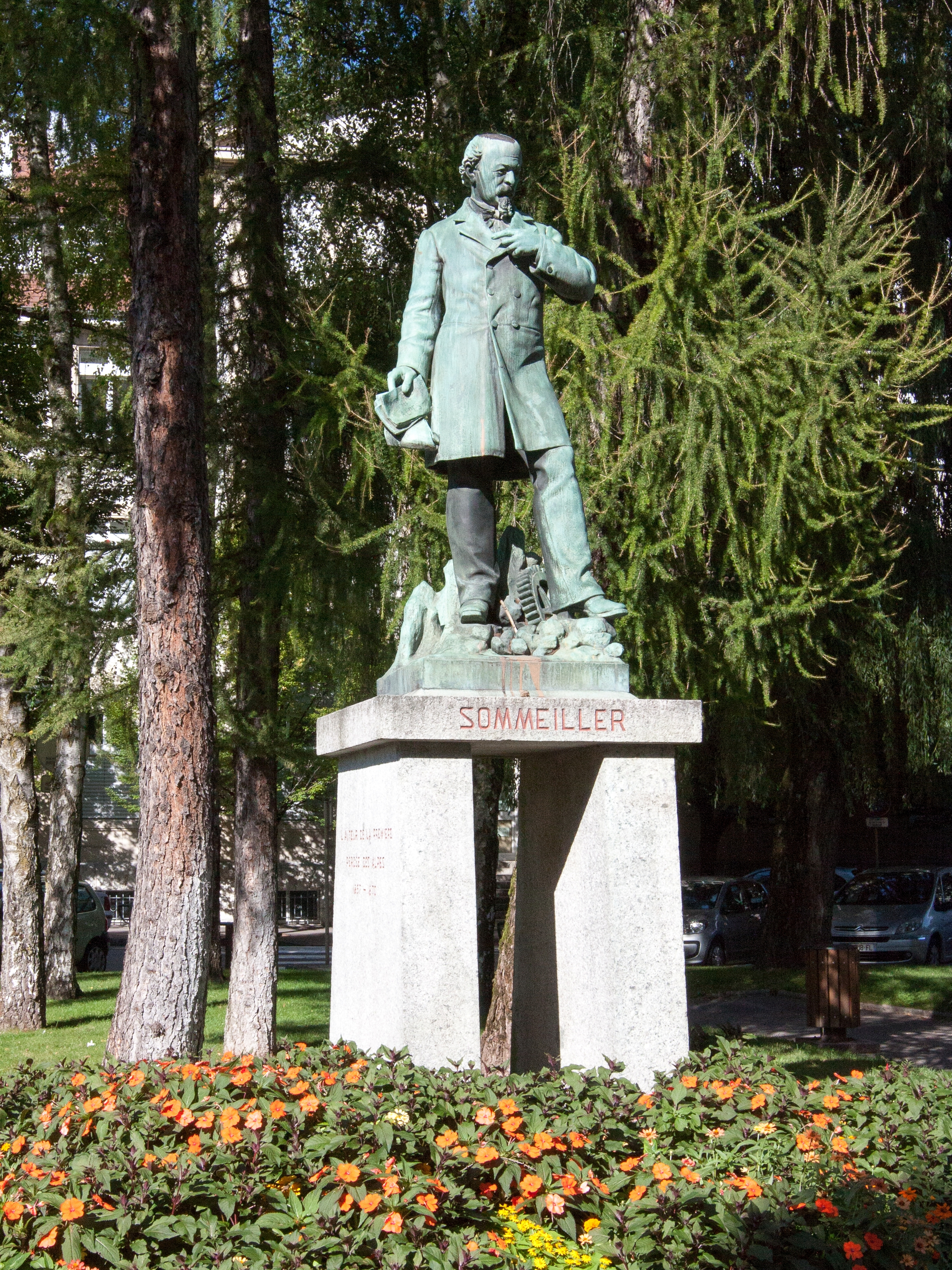 Statue de Germain Sommeiller devant le lycée technique Sommeiller / Annecy / Haute-Savoie / France